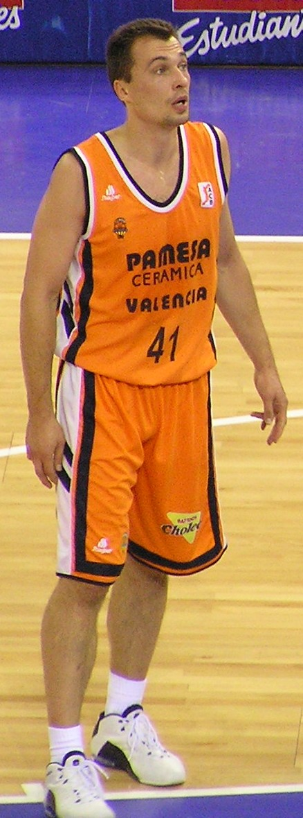 Mindaugas Timinskas en la seua última temporada amb els taronja.